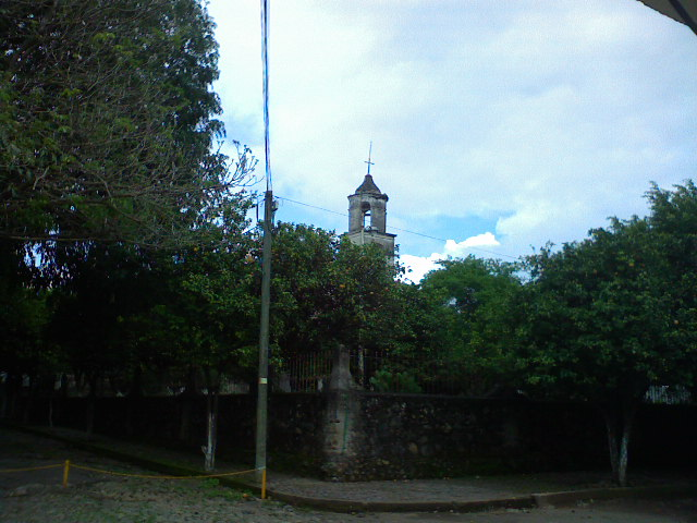 foto del templo del señor de la ascencion de santa maria del oro, nayarit, mexico